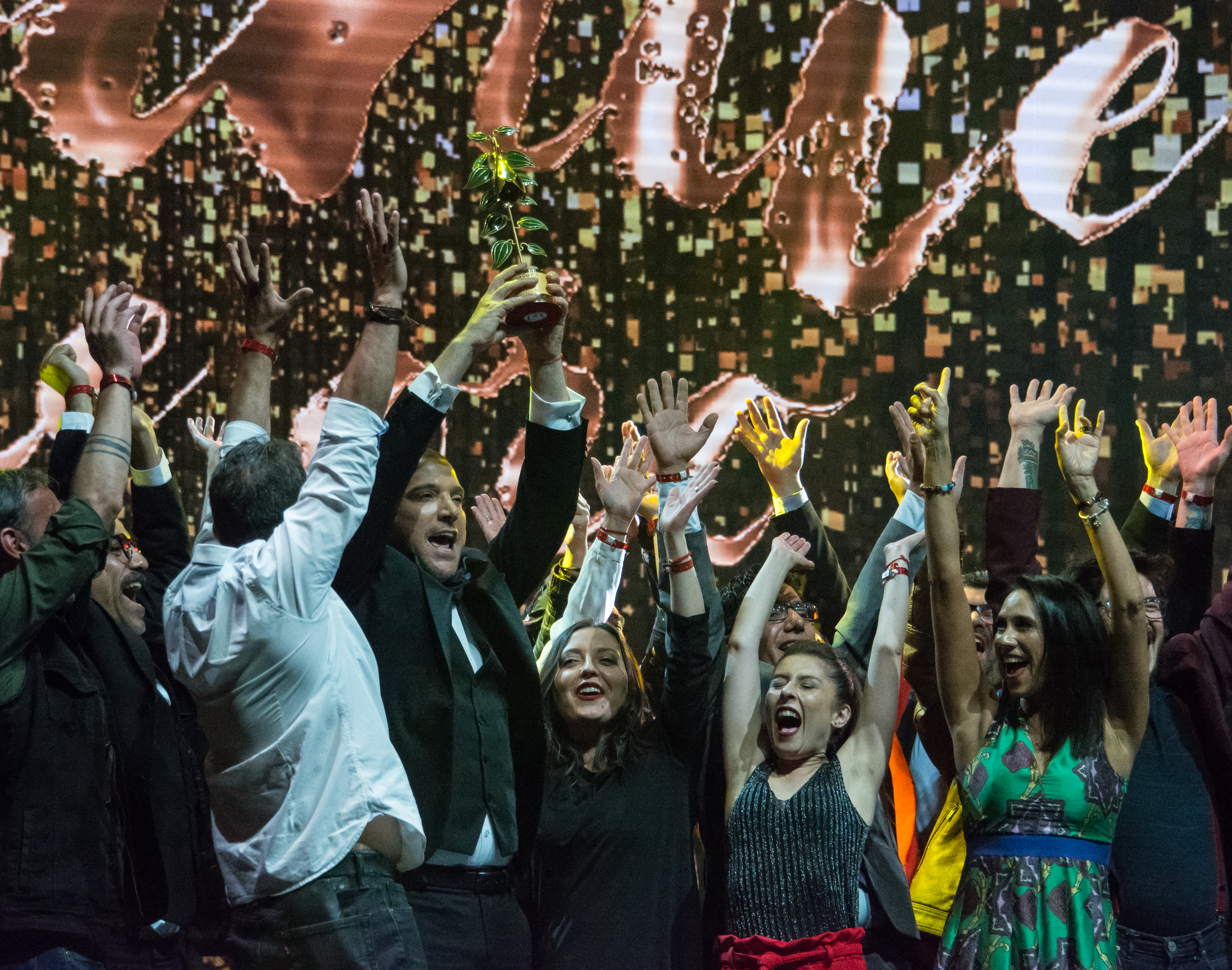 Equipo de Pasapalabra, Copihue de Oro 2018, Sun Monticello, Mostazal, Región de O'Higgins, Chile